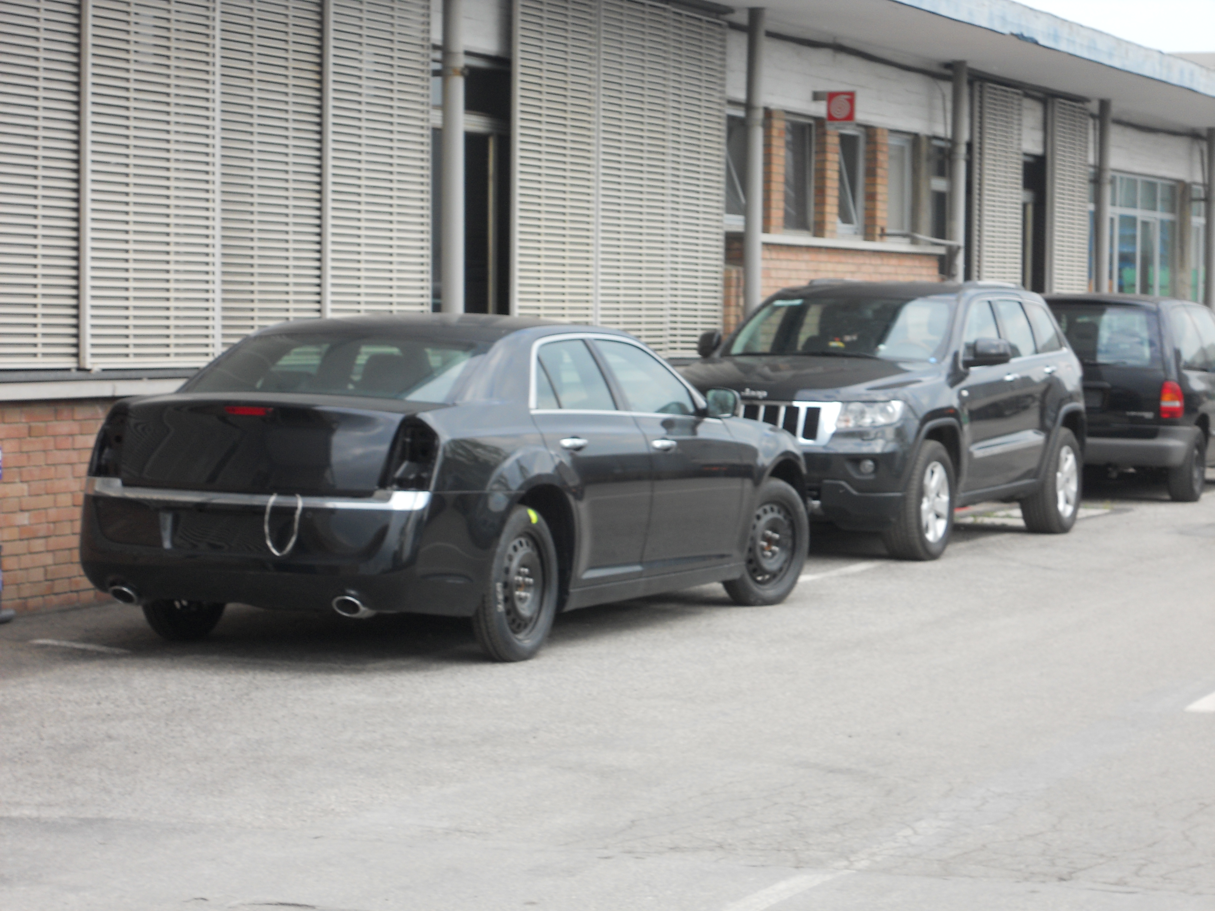 Un mulo per test di Lancia Thema ( o Chrysler 300) e di fianco un mulo di una Jeep Grand Cherokee alla VM Motori